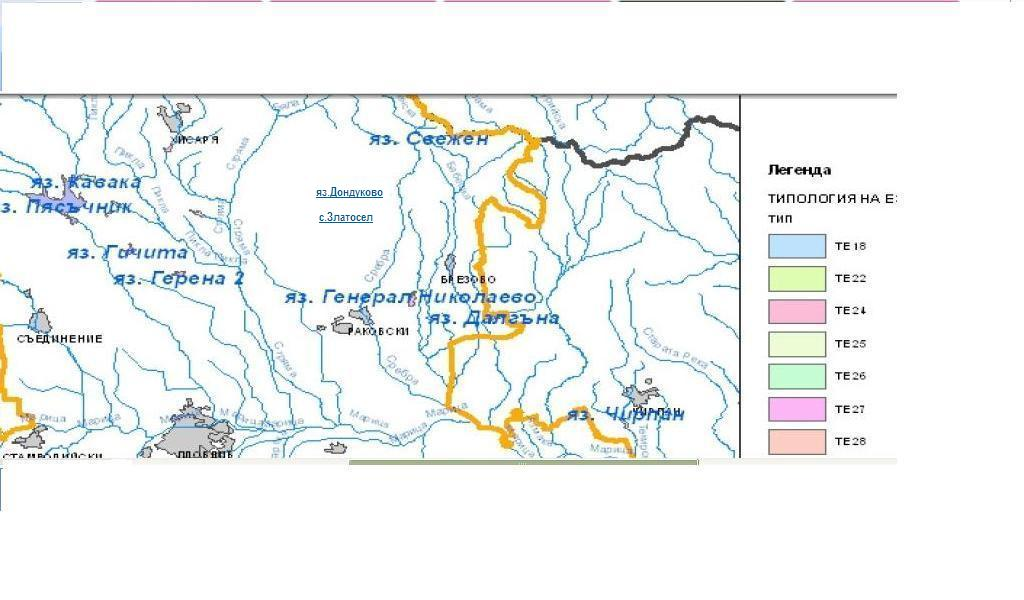 карта на река Сребра,област Пловдив